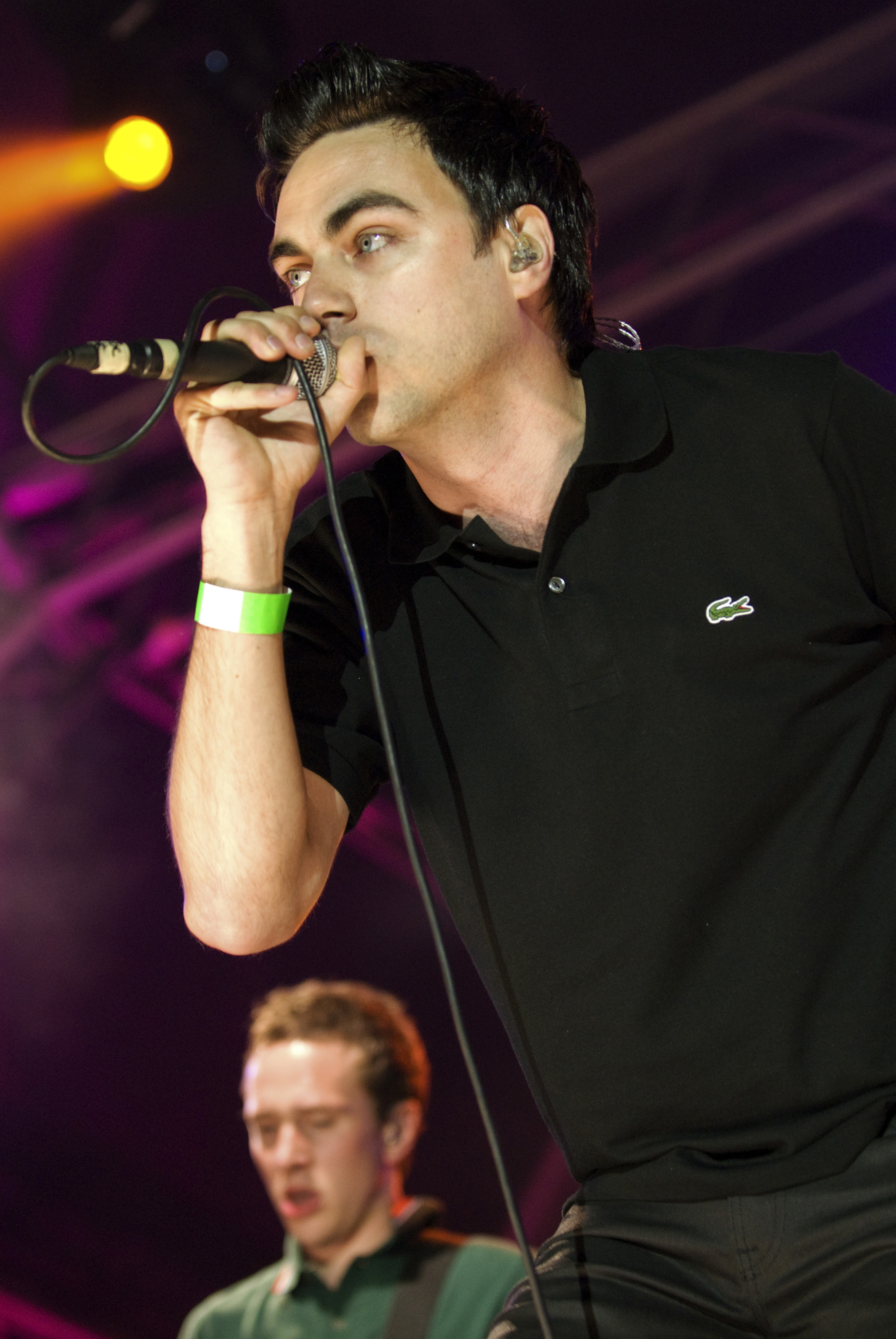 Hard-Fi